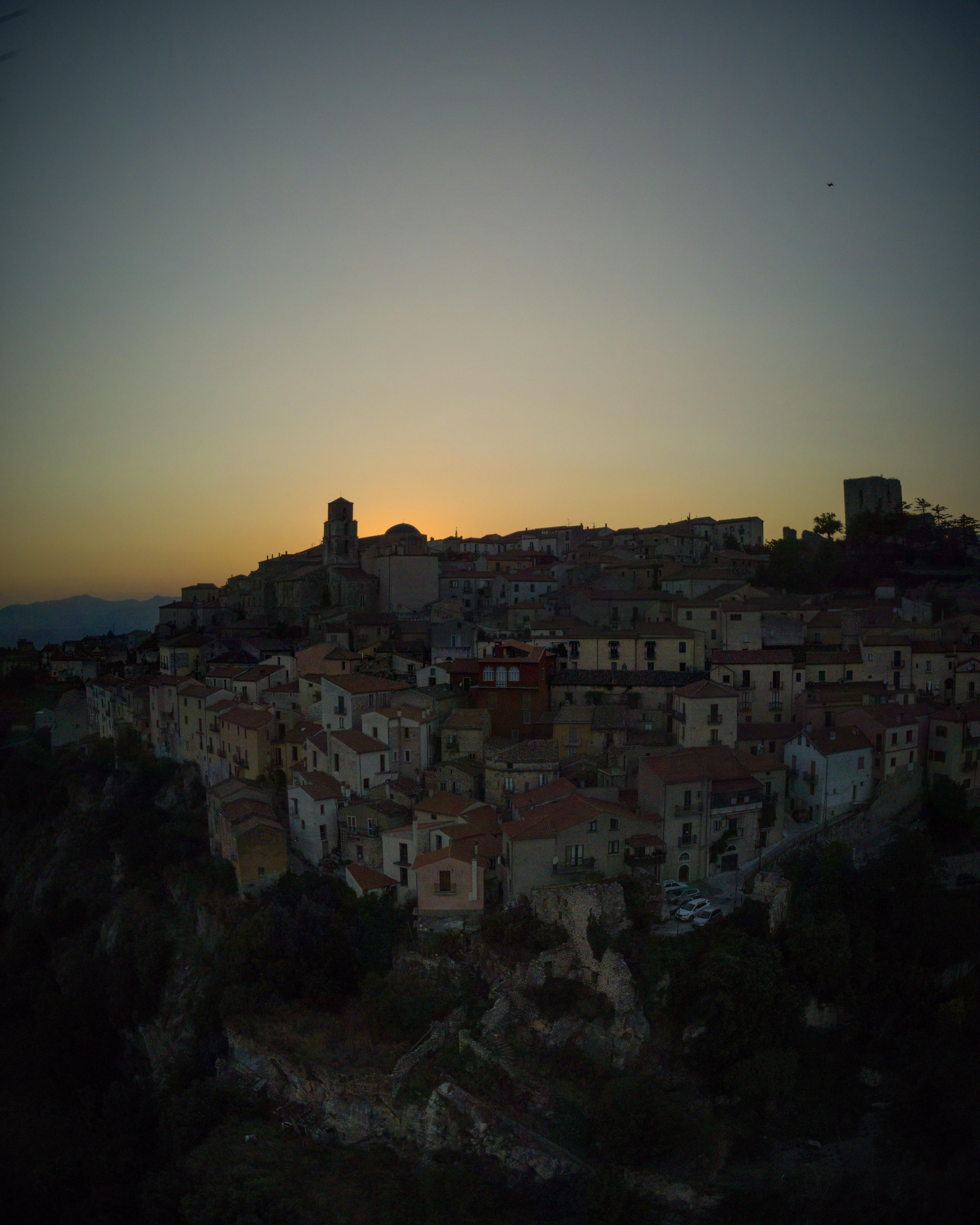 parco archeologico urbano di Volcei This is a photo of a monument which is part of cultural heritage of Italy.